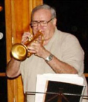 Foto del trompetista Argentino Fat Fernandez.